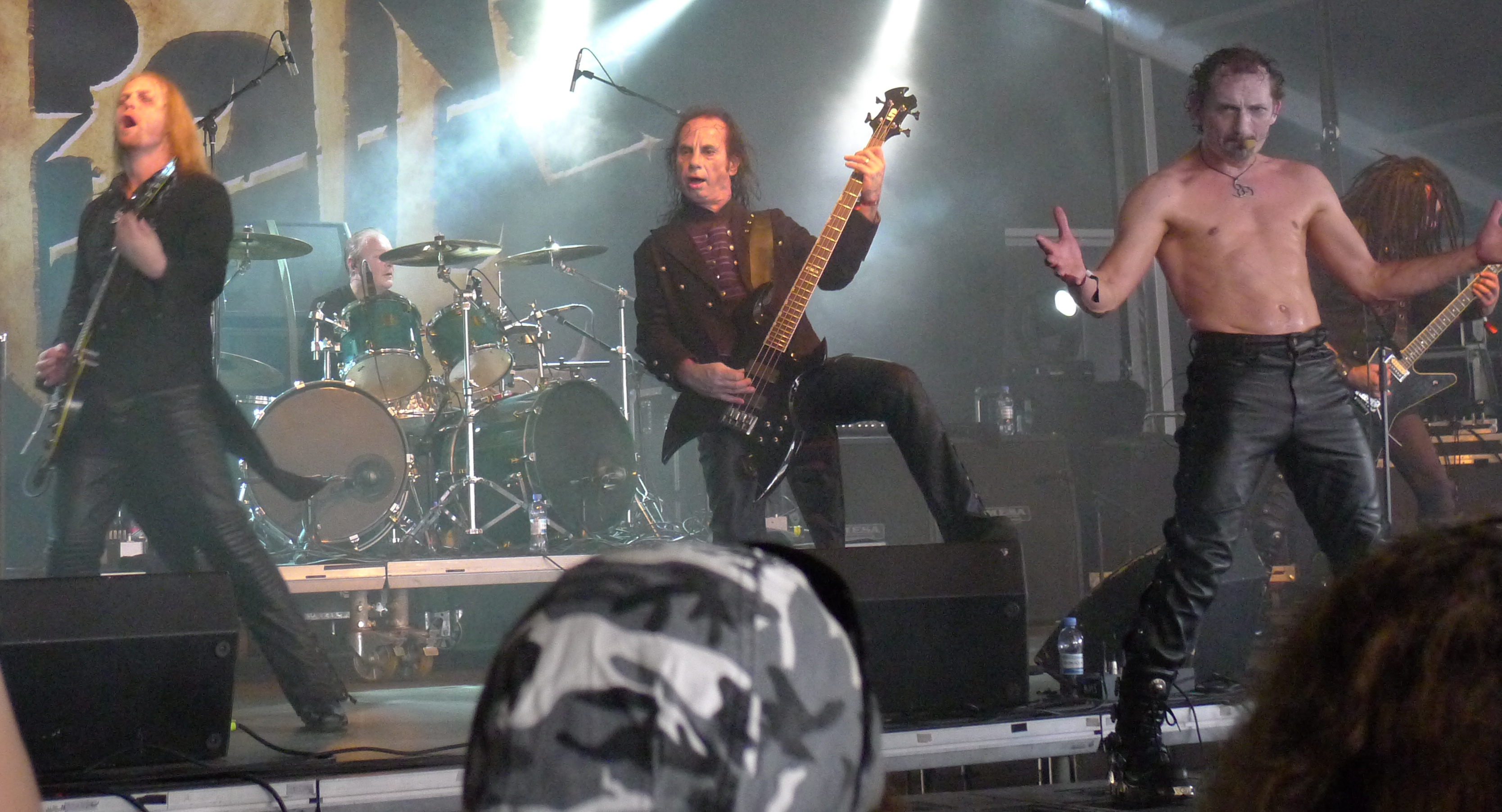 Hell live am Tuska Open Air 2011